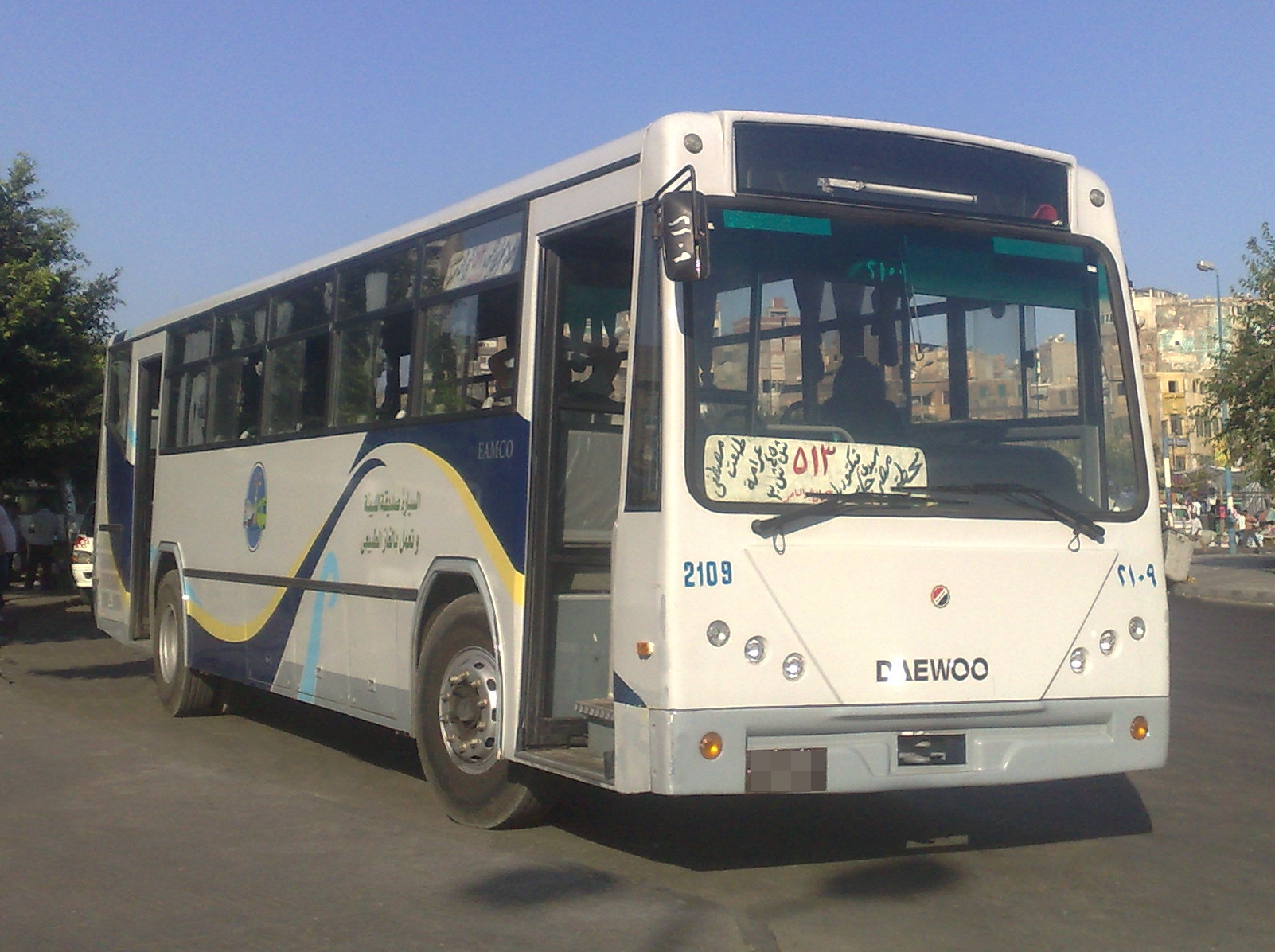 حافلة نقل داخلي بالإسكندرية